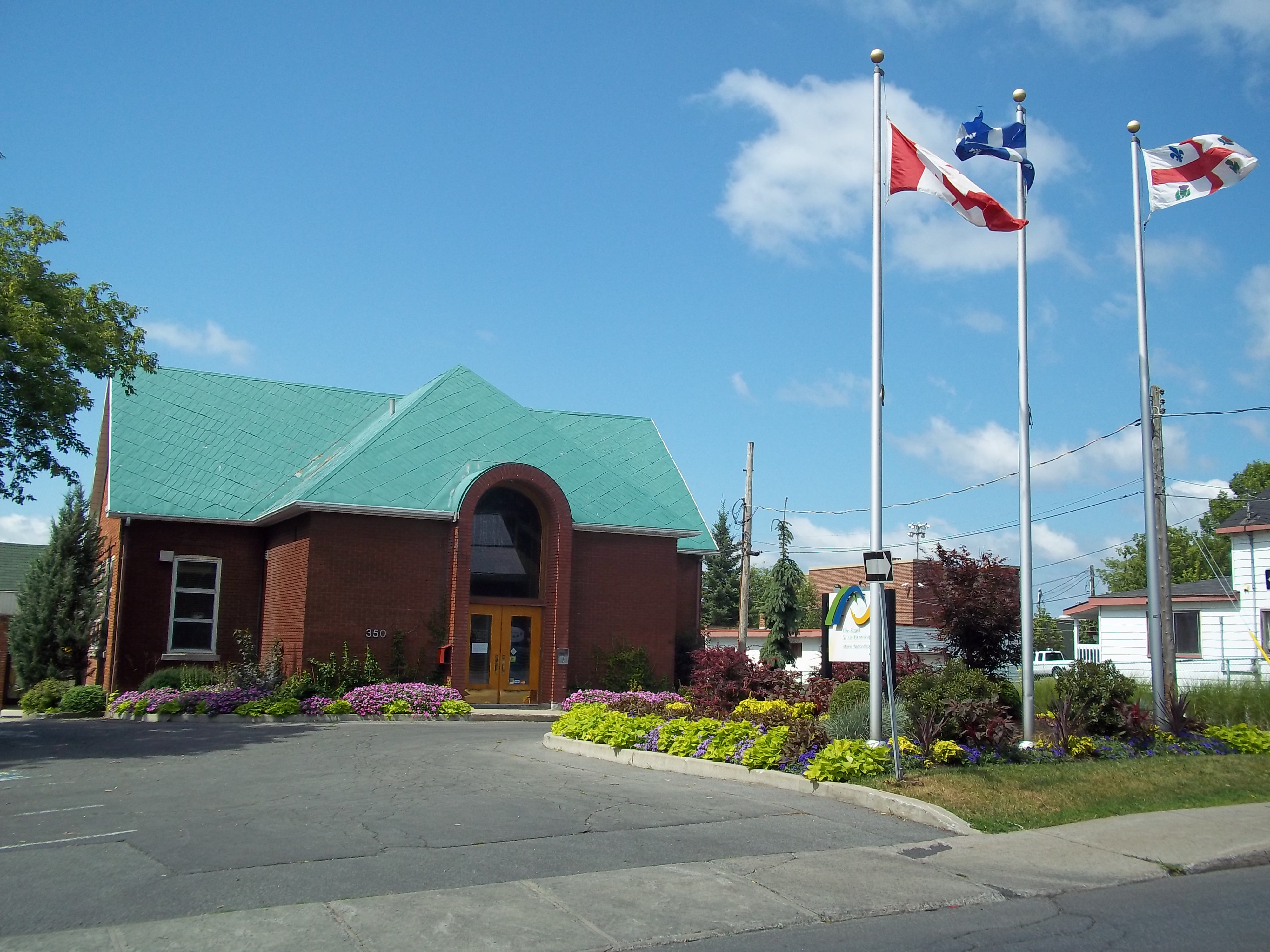 École du village (hôtel de ville de l'île Bizard), 350, montée de l'Église, L'Île-Bizard–Sainte-Geneviève (Montréal) (info)